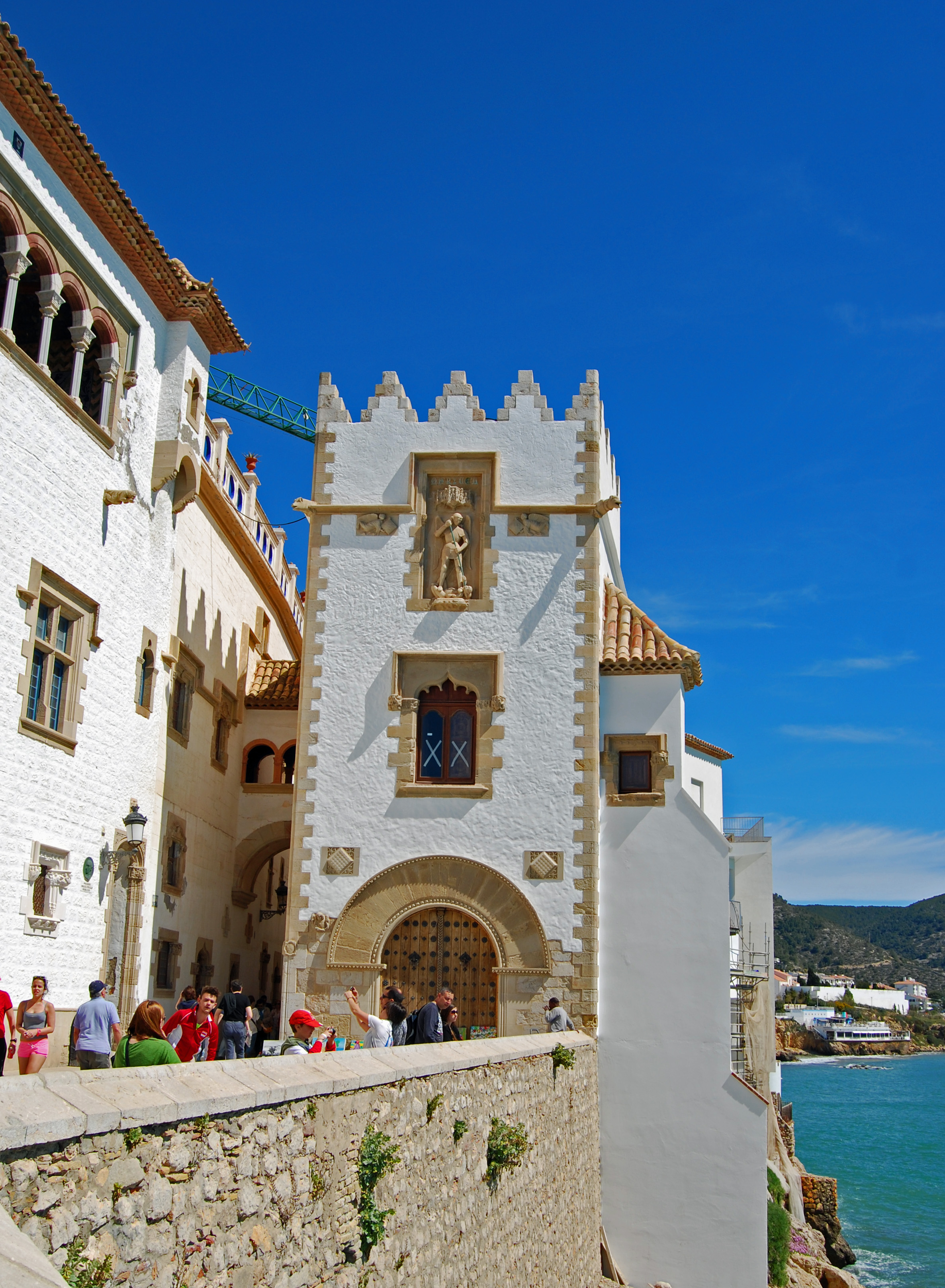 Museu Cau Ferrat, Palau Maricel Sitges